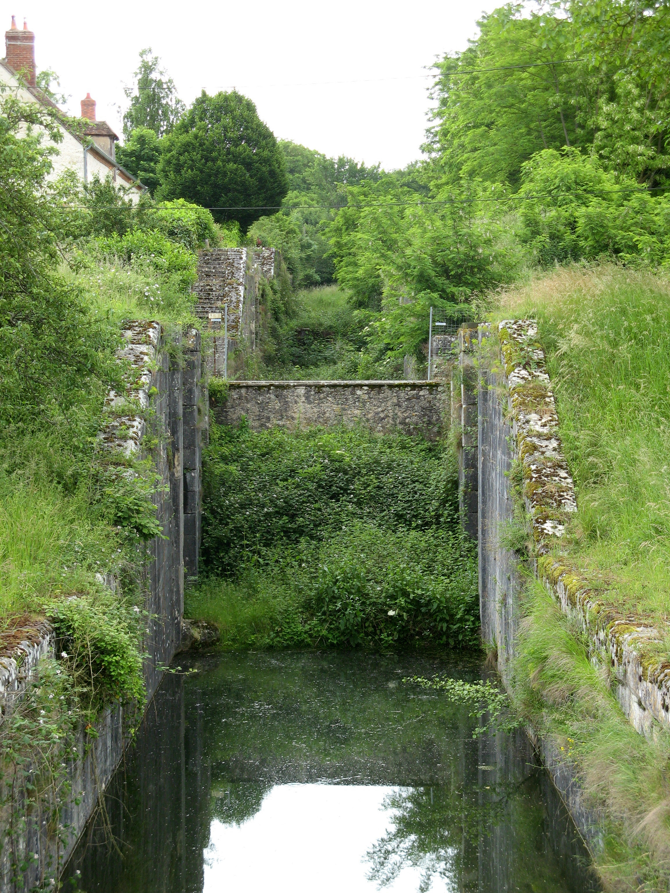 Latitude 47 47 34.2 N .